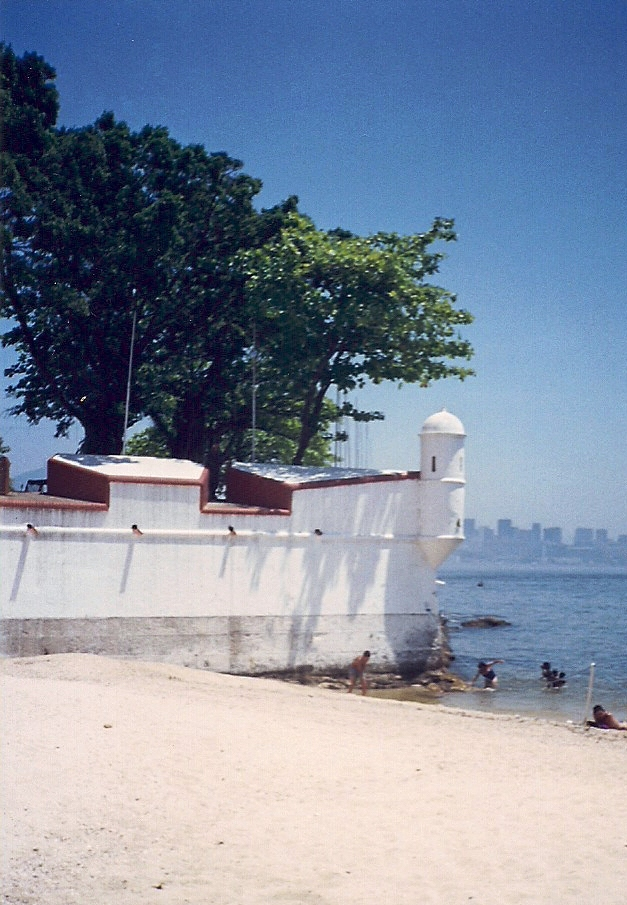 Forte de São Domingos de Gragoatá, Niterói, RJ, Brasil: vista a partir da praia.